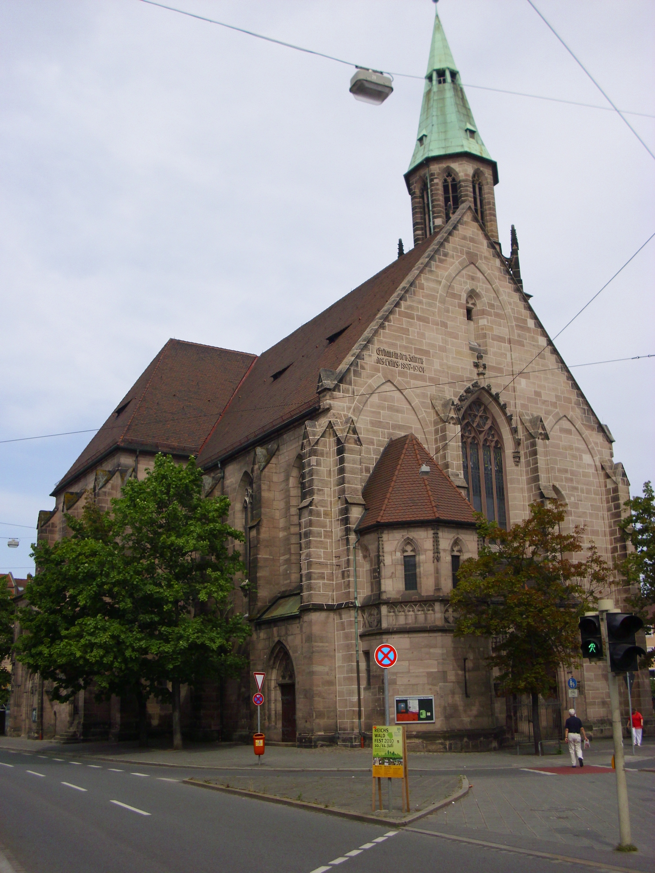 Peterskirche Nürnberg Juli 2010 19